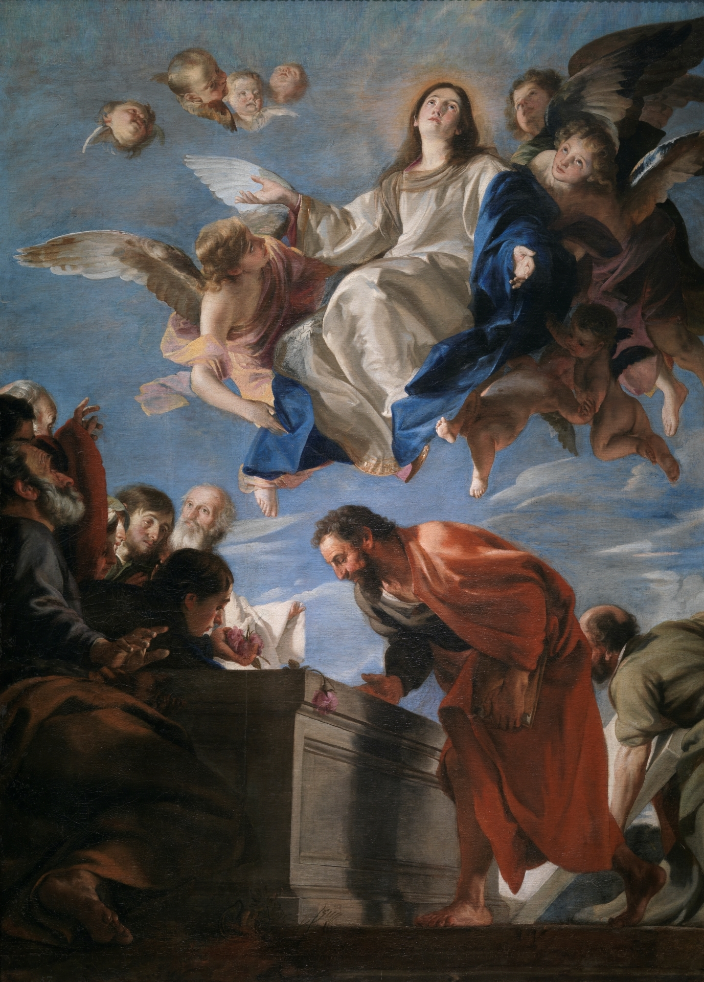 La obra representa la asunción de la Virgen María en cuerpo y alma a los Cielos.